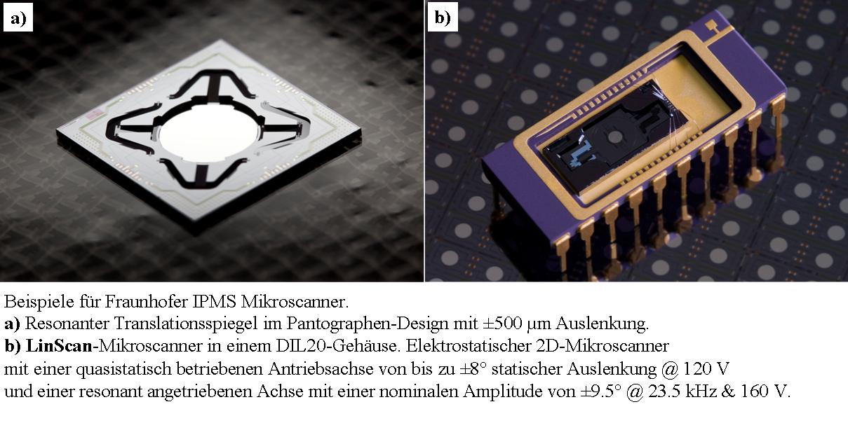 Beispiele für Fraunhofer IPMS Mikroscanner. a) Resonanter Translationsspiegel im Pantographen-Design mit ±500 µm Auslenkung. b) LinScan-Mikroscanner in einem DIL20-Gehäuse. Elektrostatischer 2D-Mikroscanner mit einer quasistatisch betriebenen Antriebsachse von bis zu ±8° statischer Auslenkung @ 120 V und einer resonant angetriebenen Achse mit einer nominalen Amplitude von ±9.5° @ 23.5 kHz & 160 V.